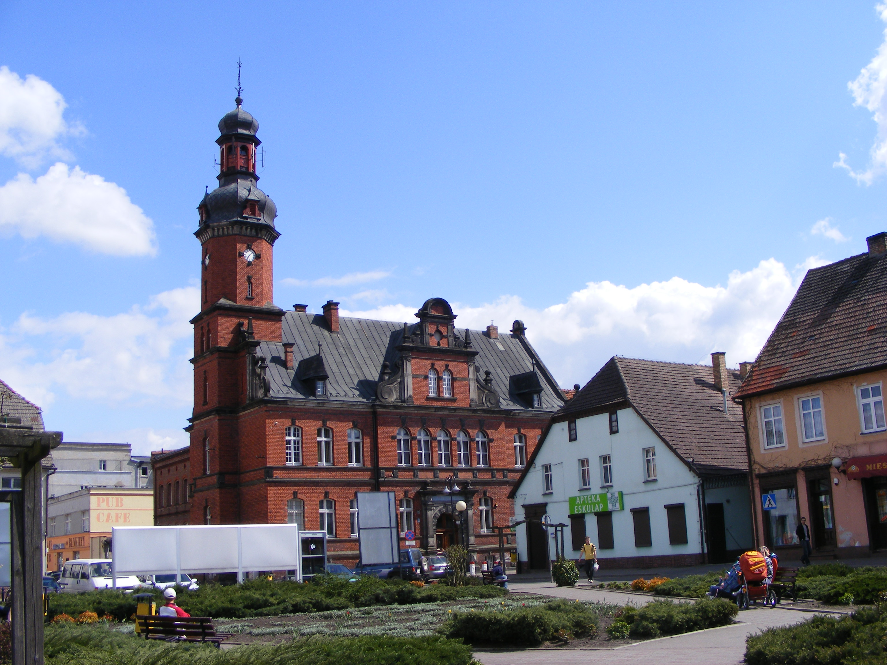 Drezdenko-Stary Rynek